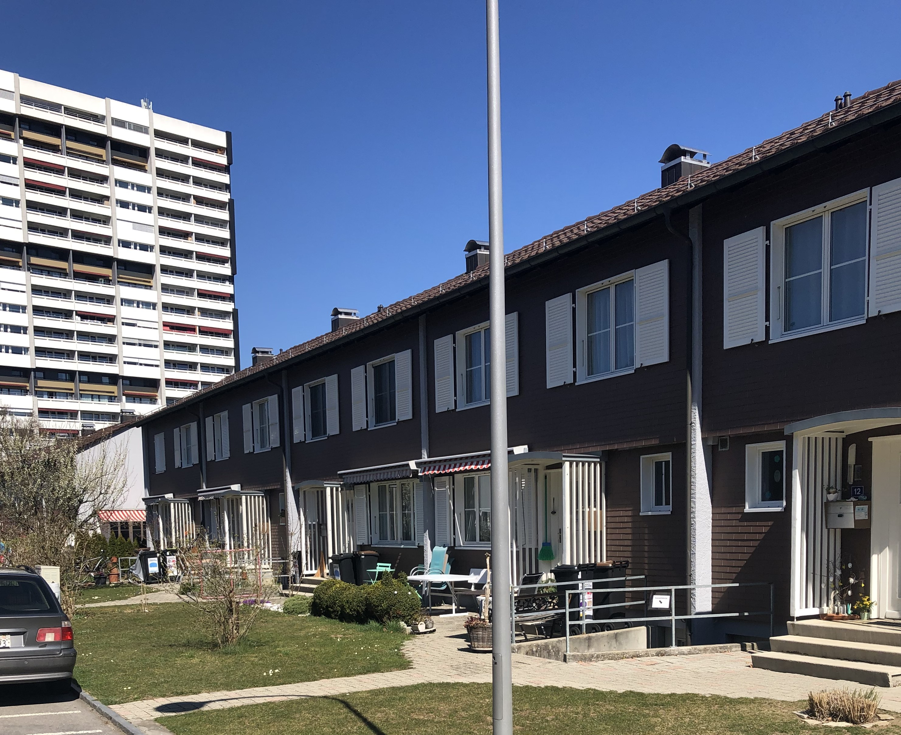 Bethlehemacker Siedlung und Hochhaus